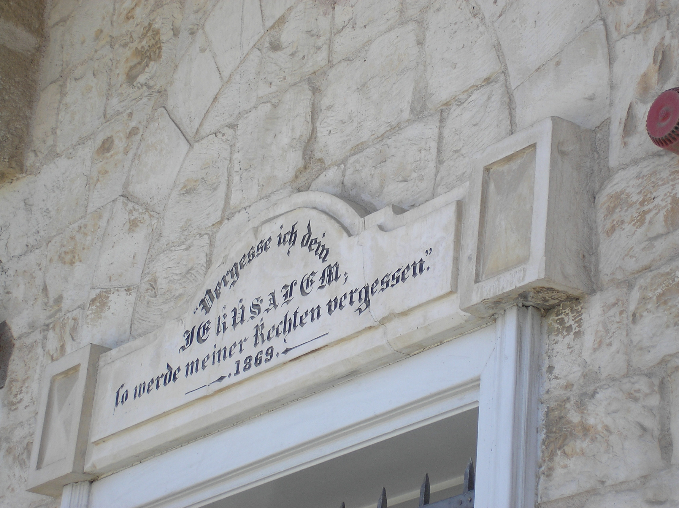 Beit Haam - detail בית העם בחיפה - כיום מוזיאון העיר חיפה